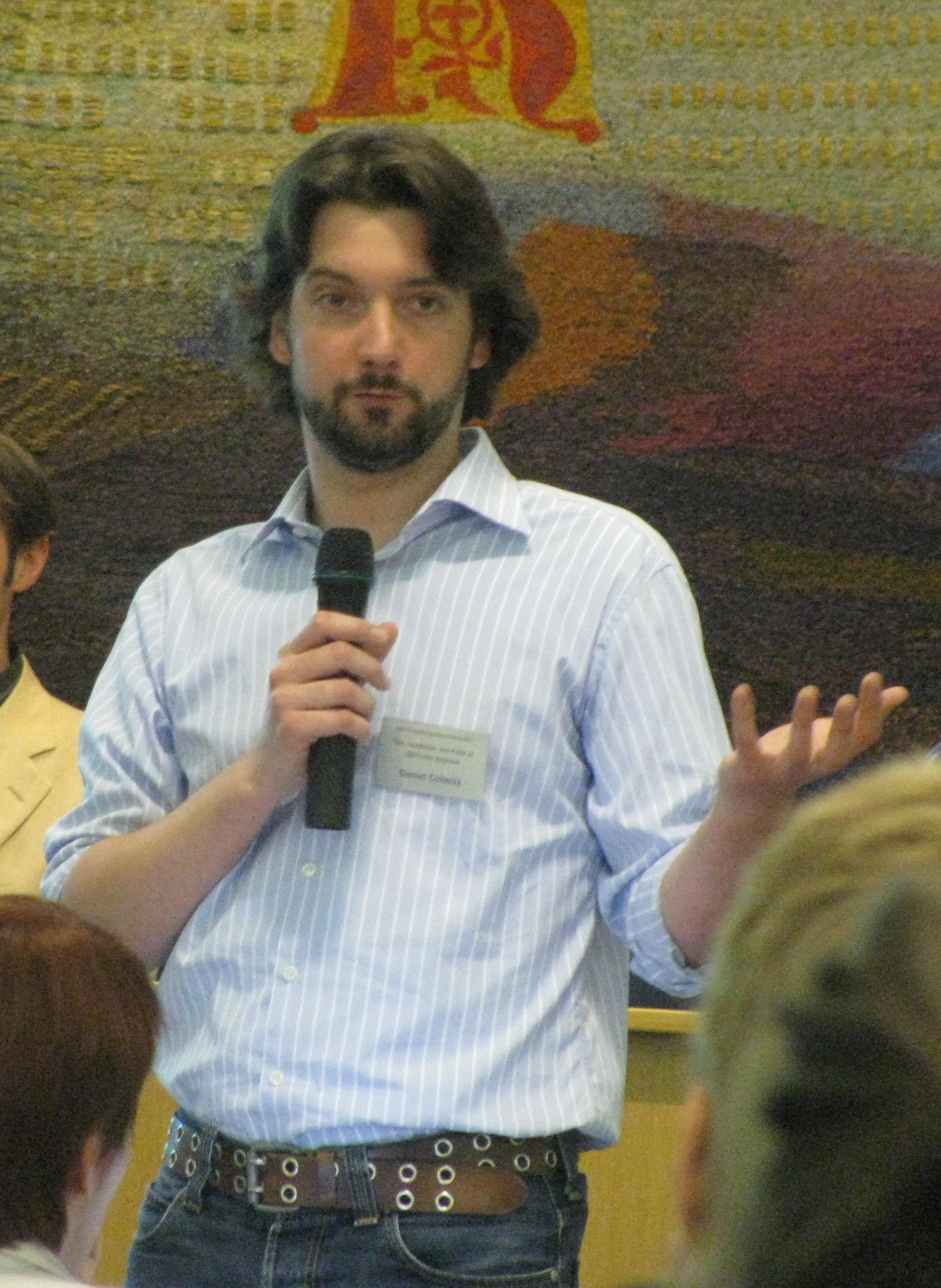 Daniel Cohnitz esinemas Eesti filosoofia 7. aastakonverentsil Tartus